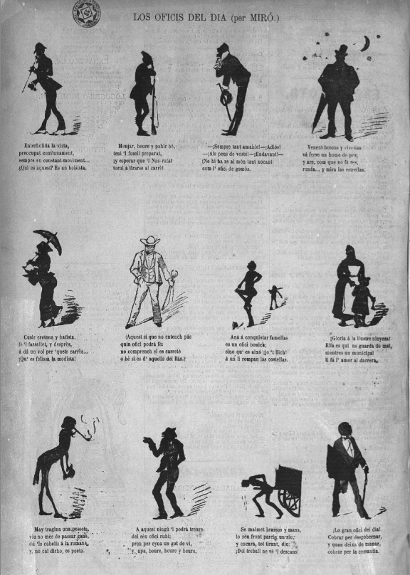 Página de la revista La Esquella de la Torratxa